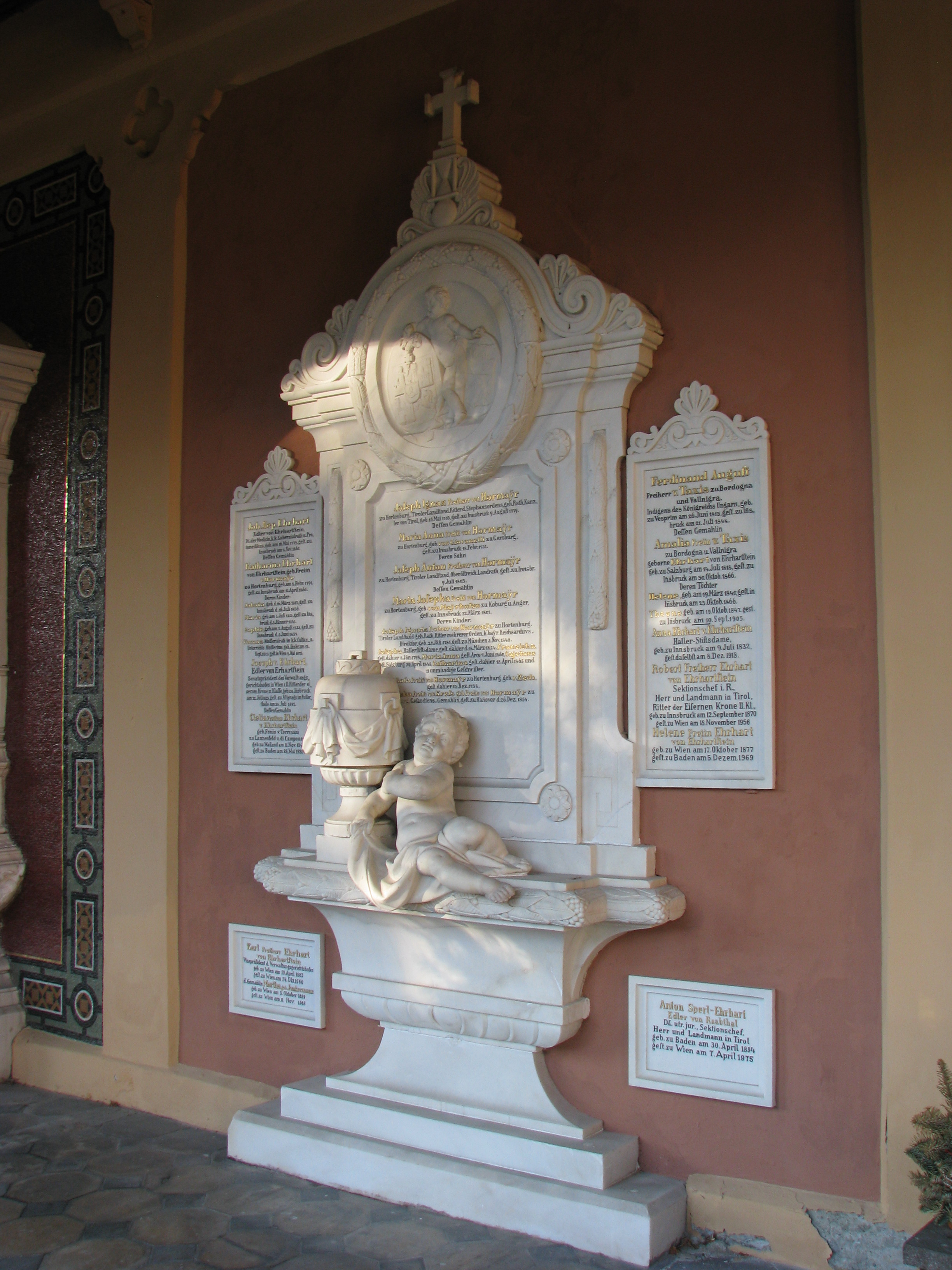 Hormayr'sches Grabmal unter den Nordarkaden des Westfriedhofs, Innsbruck